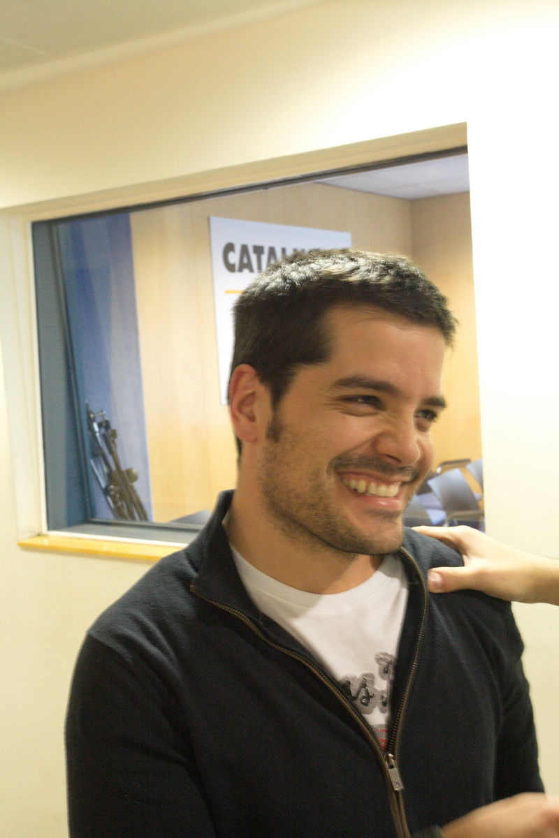 Imatges captades durant la Viquimarató Ramon Barnils a Catalunya Ràdio el 13-3-2015 per commemorar els 14 anys de la mort del periodista Ramon Barnils